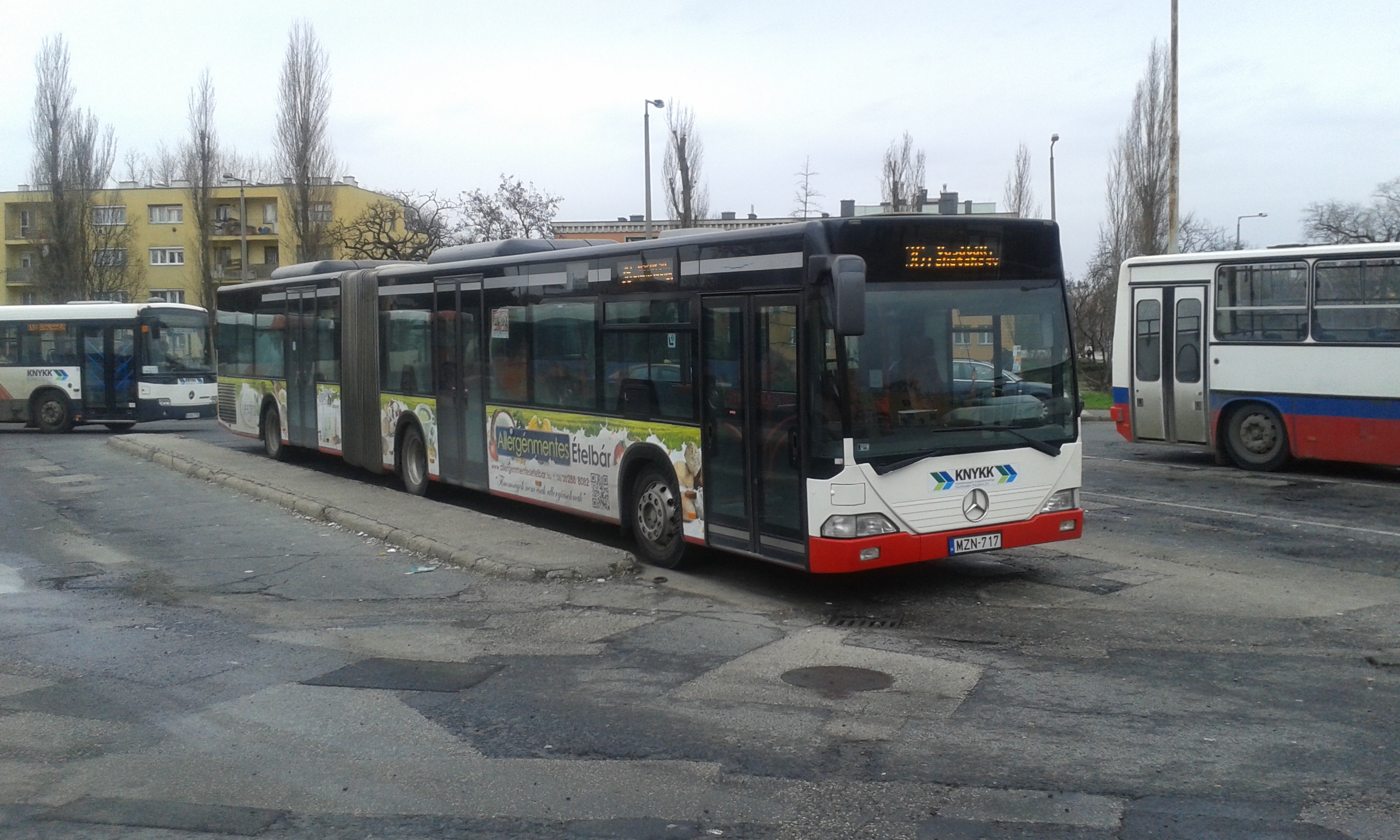 Az egyik új 2015-ben forgalomba állt Citaro várakozik a vasúton 36-os buszként.